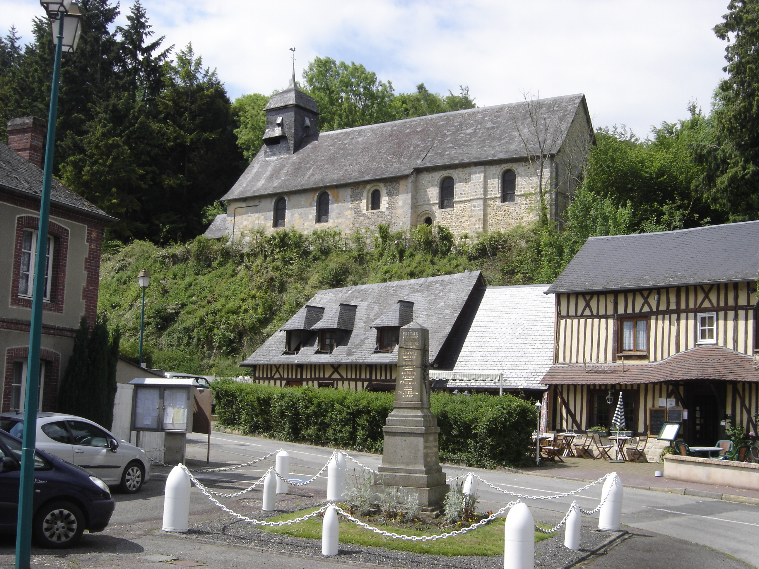 Les Préaux (Eure - France) le village et l'église